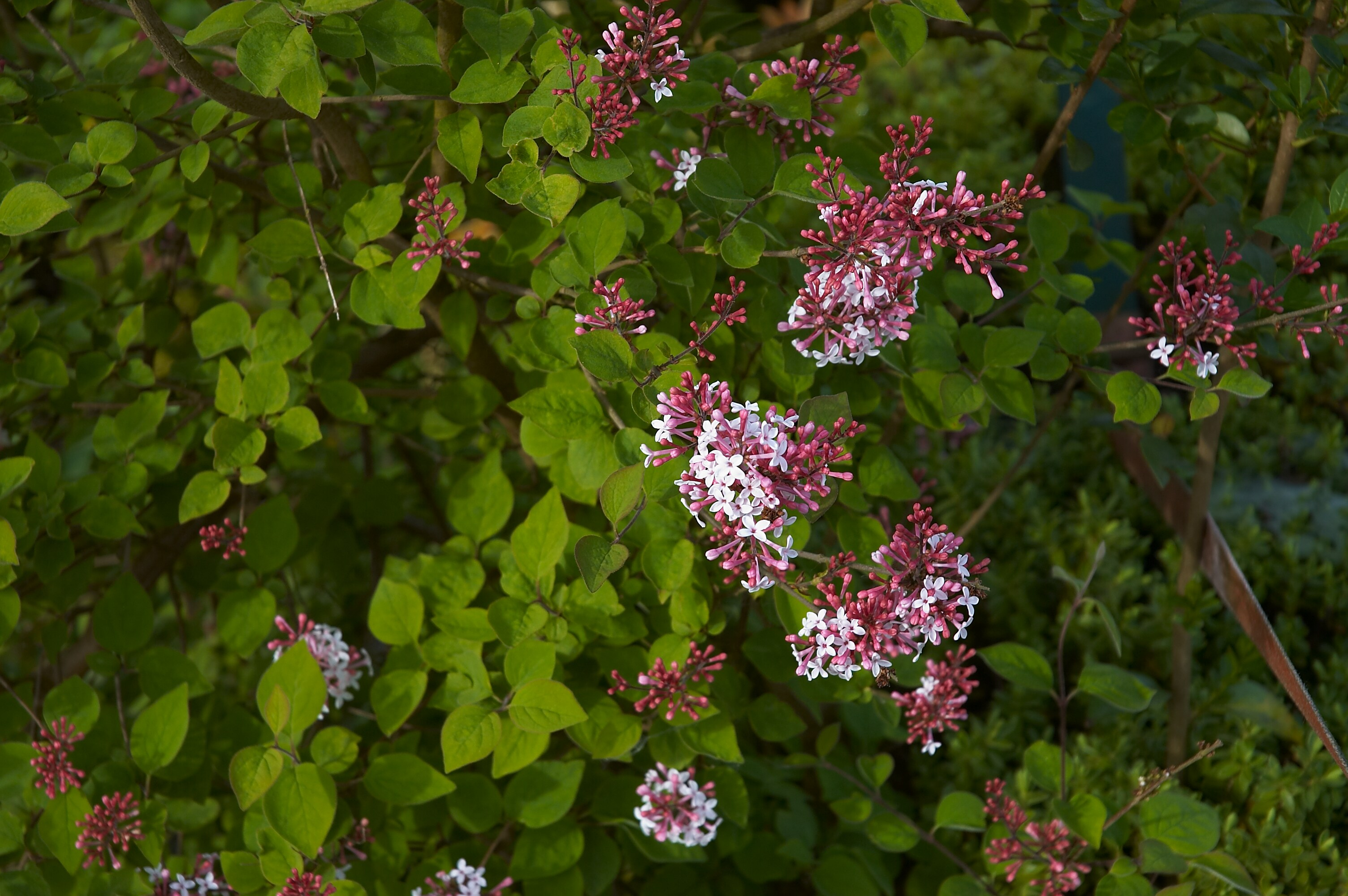 Syringa pubescens subsp. microphylla ´Superba´